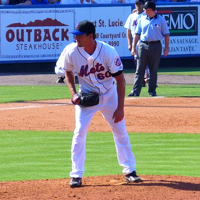 Scott Schoeneweis 03:46, 19 July 2007 . . Metsfan7 . . 700×700, 458 KB